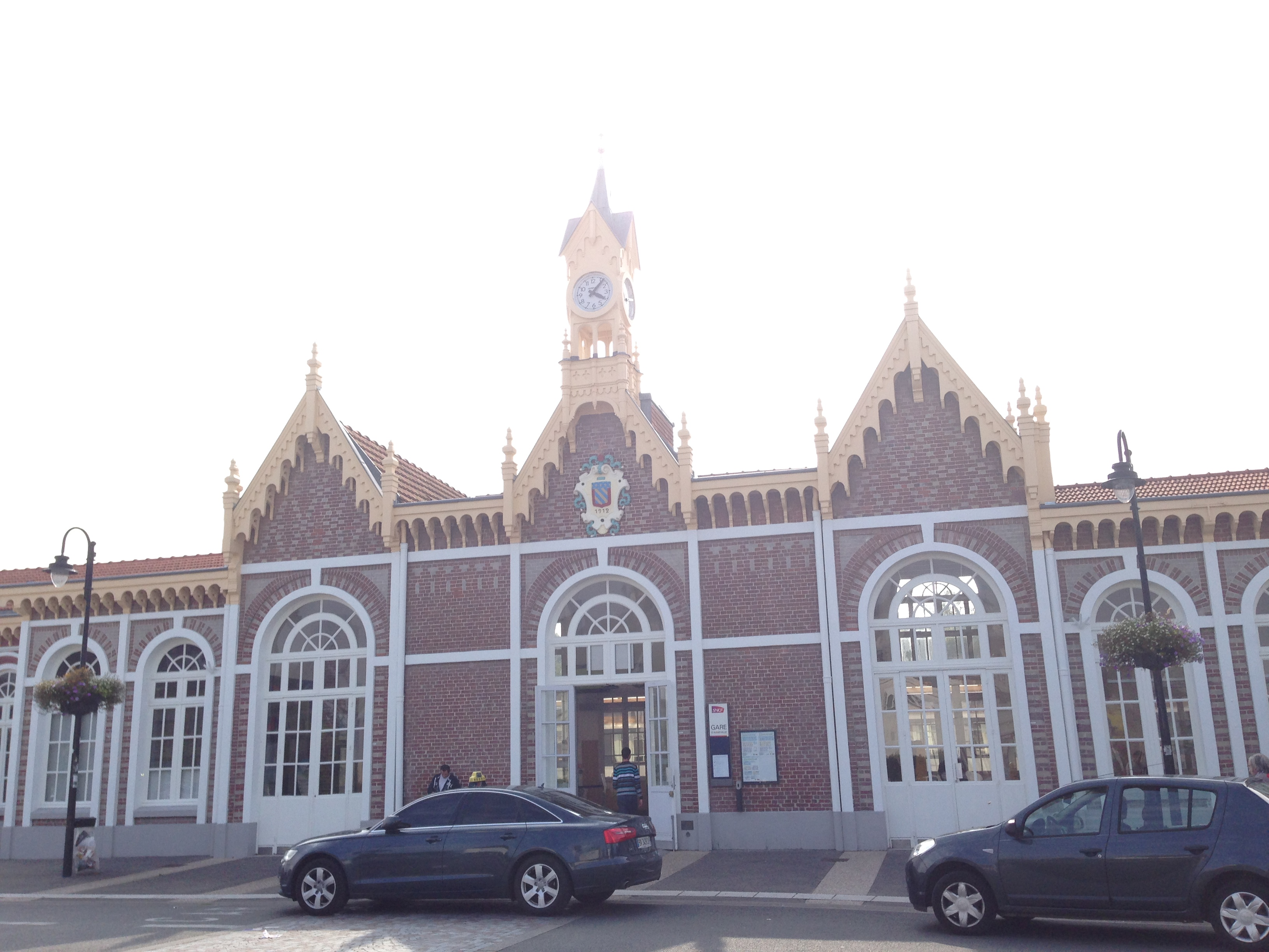 Gare d'Abbeville-2014